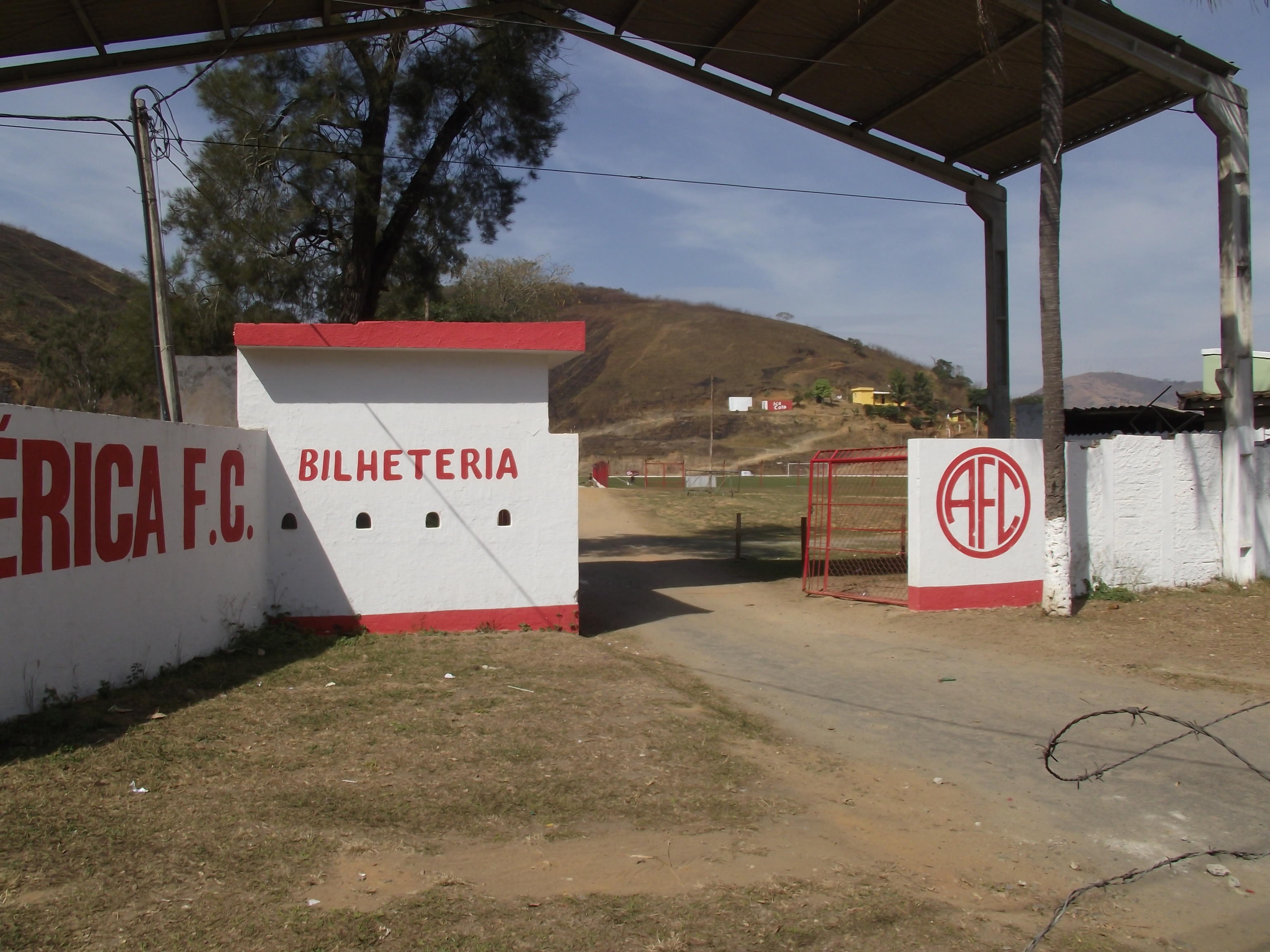 Sede do América de Três Rios, localizada no Alto Purys.